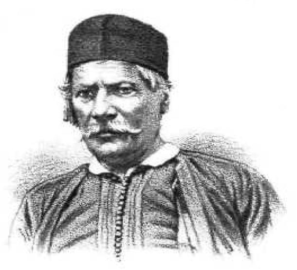 Griechischer Freiheitskämpfer, 19. Jahrhundert